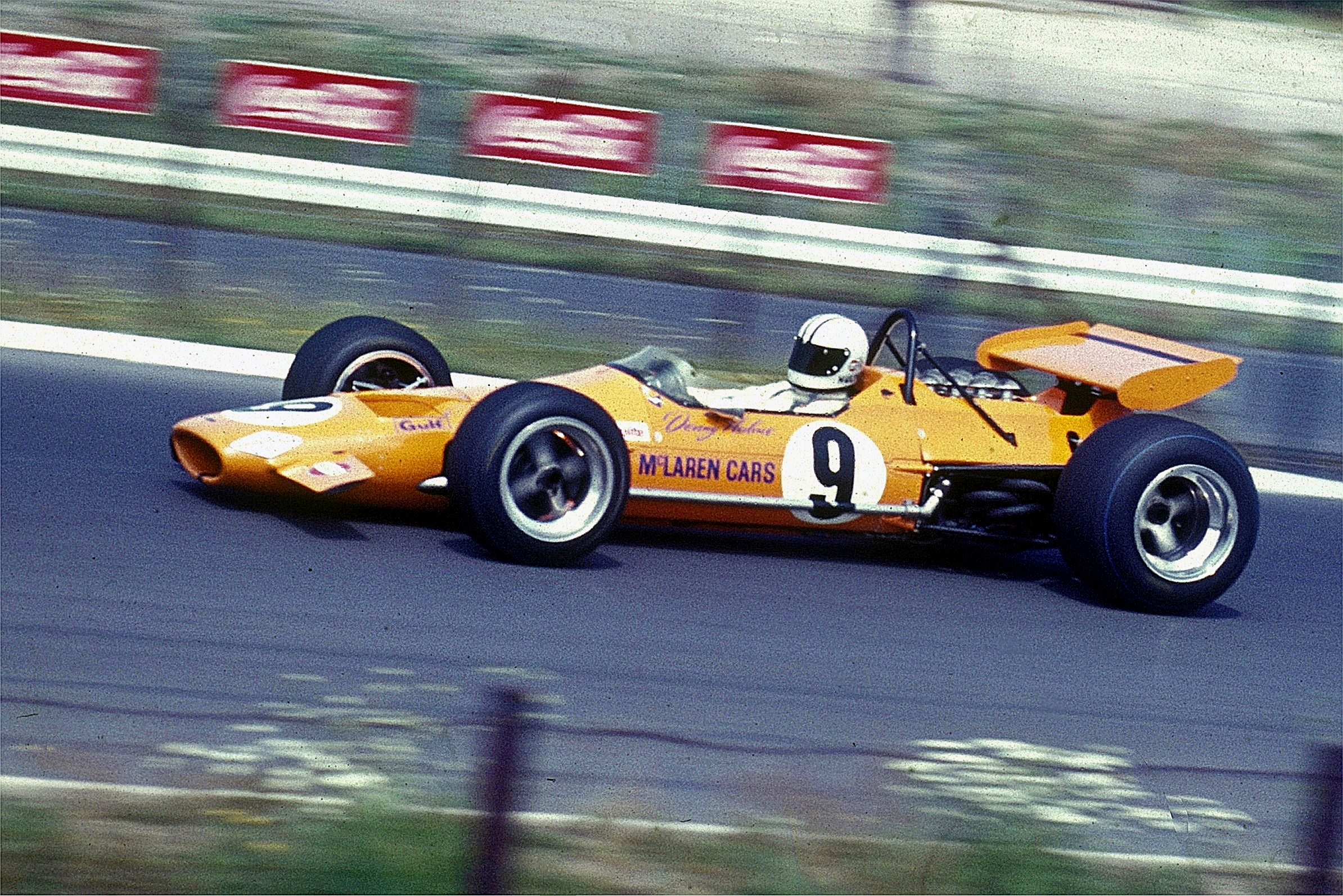 Denis Hulme im McLaren M7A